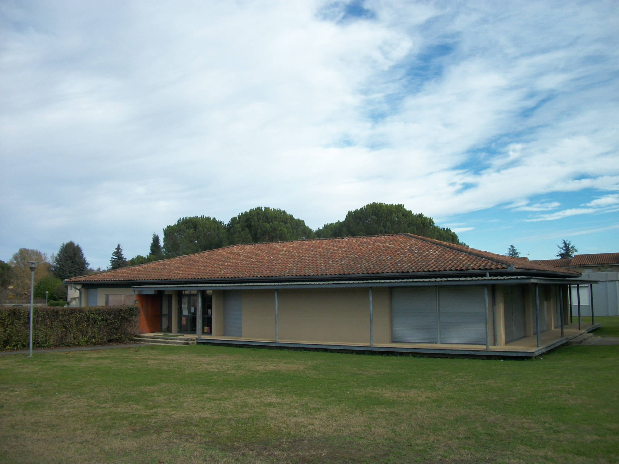 Médiathéque de Gourdan-Polignan